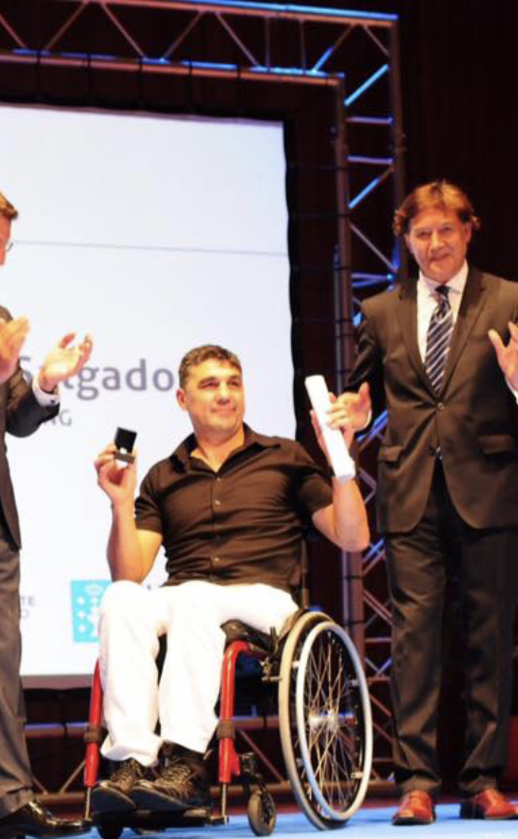 O deportista nunha entrega de premios no 2016.